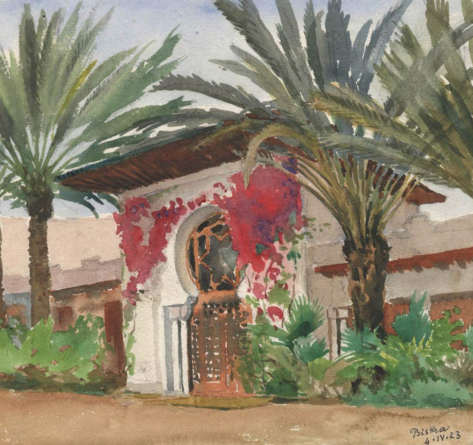 Biskra — aquarelle réalisée par le physiologiste Belge Léon Fredericq.